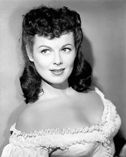 Barbara Hale, foto promozionale del film "Seminole"